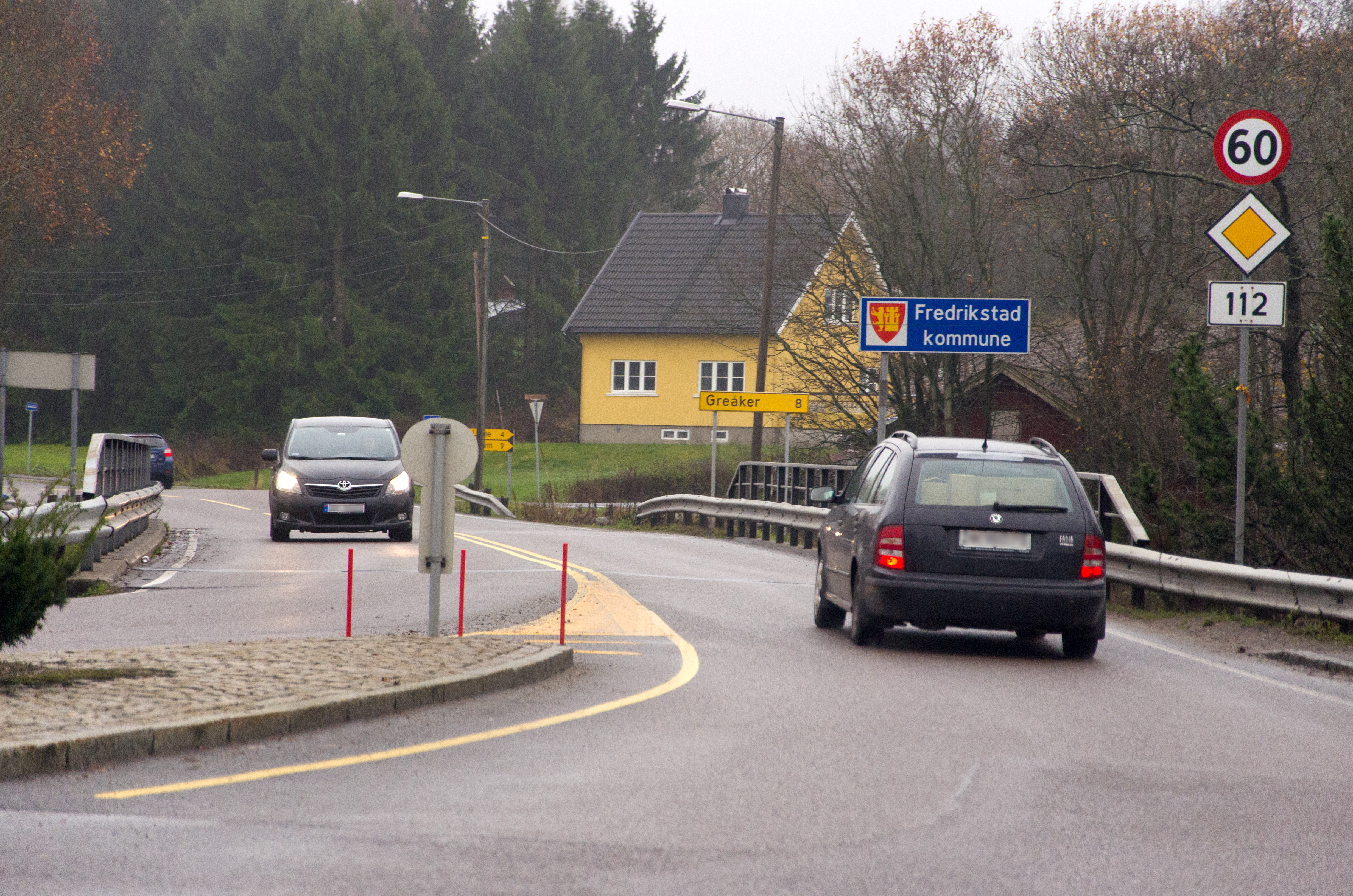 Østfolds fylkesvei 112